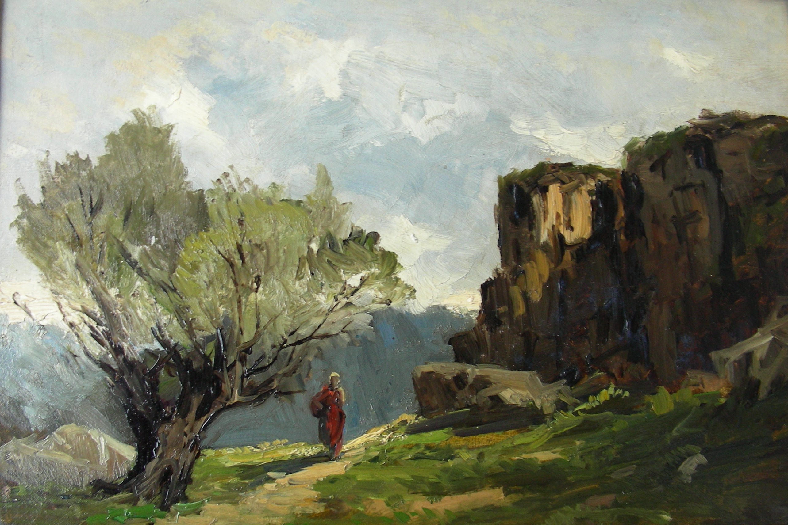 oleo de José Entrala